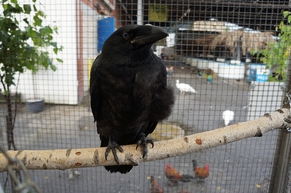 Kolkrabenjunges bei Zoo Zajac, Außengelände, Duisburg